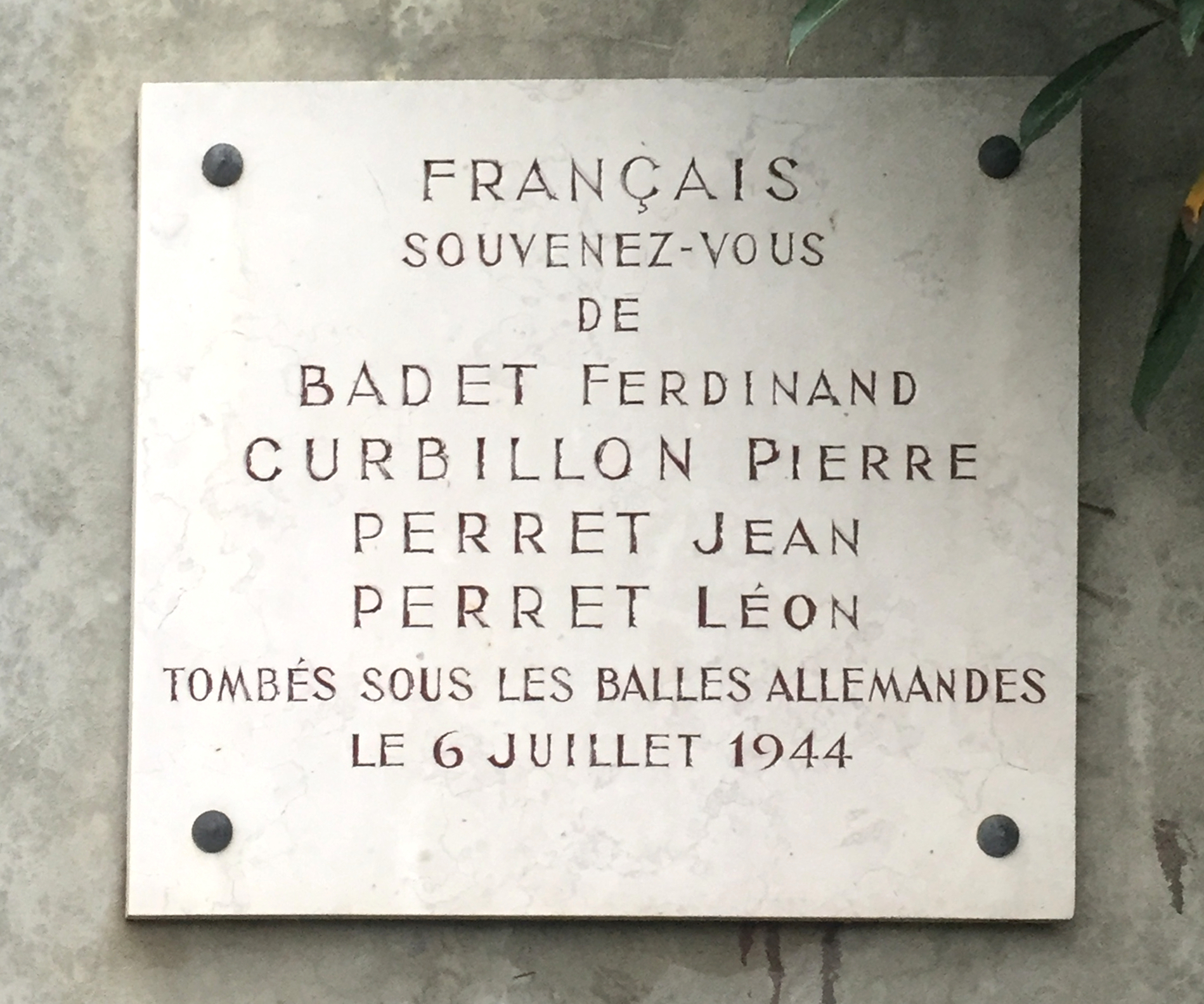 Plaque Résistance 1944 Saint-Martin-du-Mont..